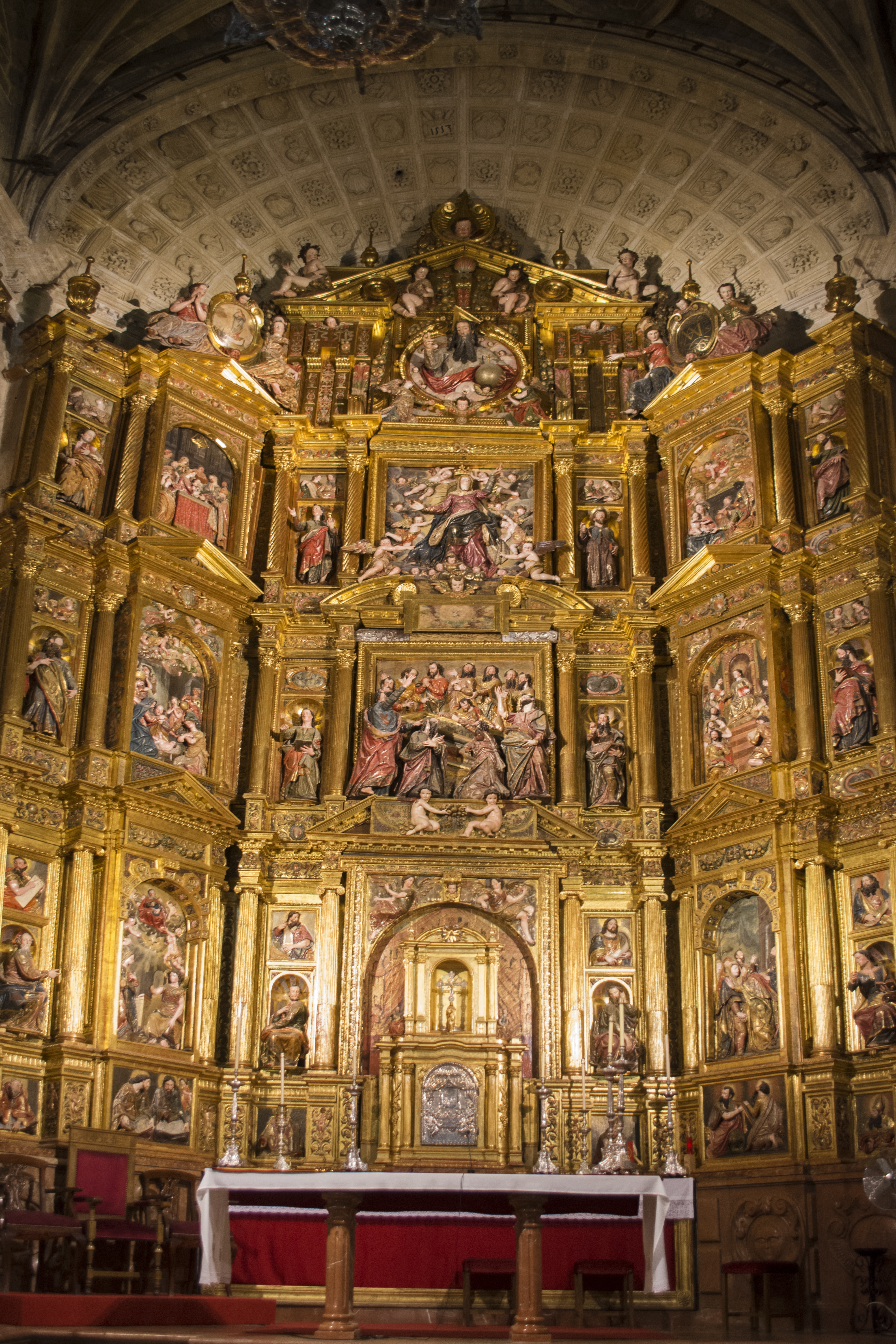 Retablo Mayor de la iglesia de Santa María de la Asunción, en Arcos de la Frontera